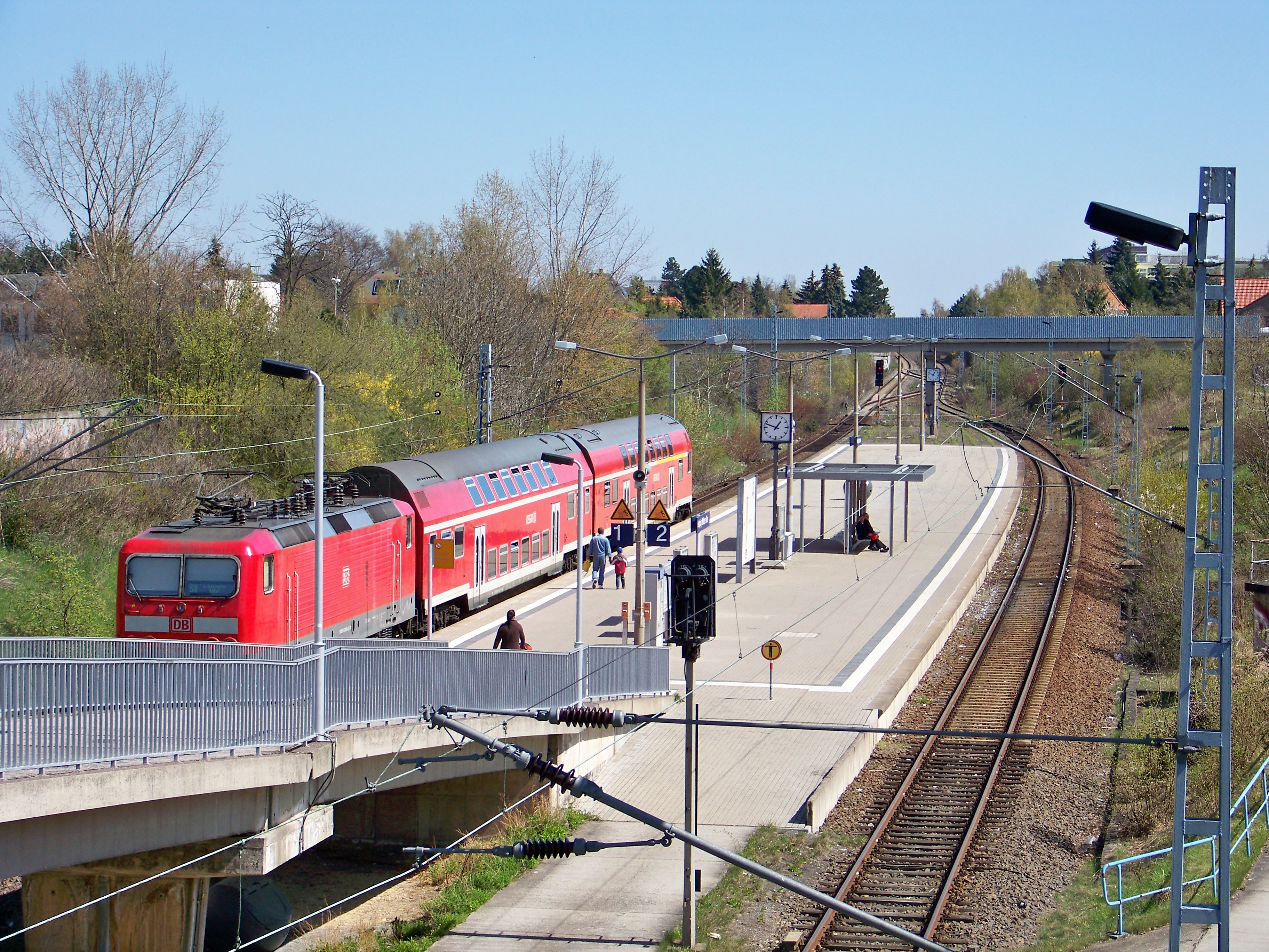 Wendende S1 der S-Bahn Leipzig-Halle im Bahnhof Miltitzer Allee im Neubaugebiet Leipzig-Grünau.